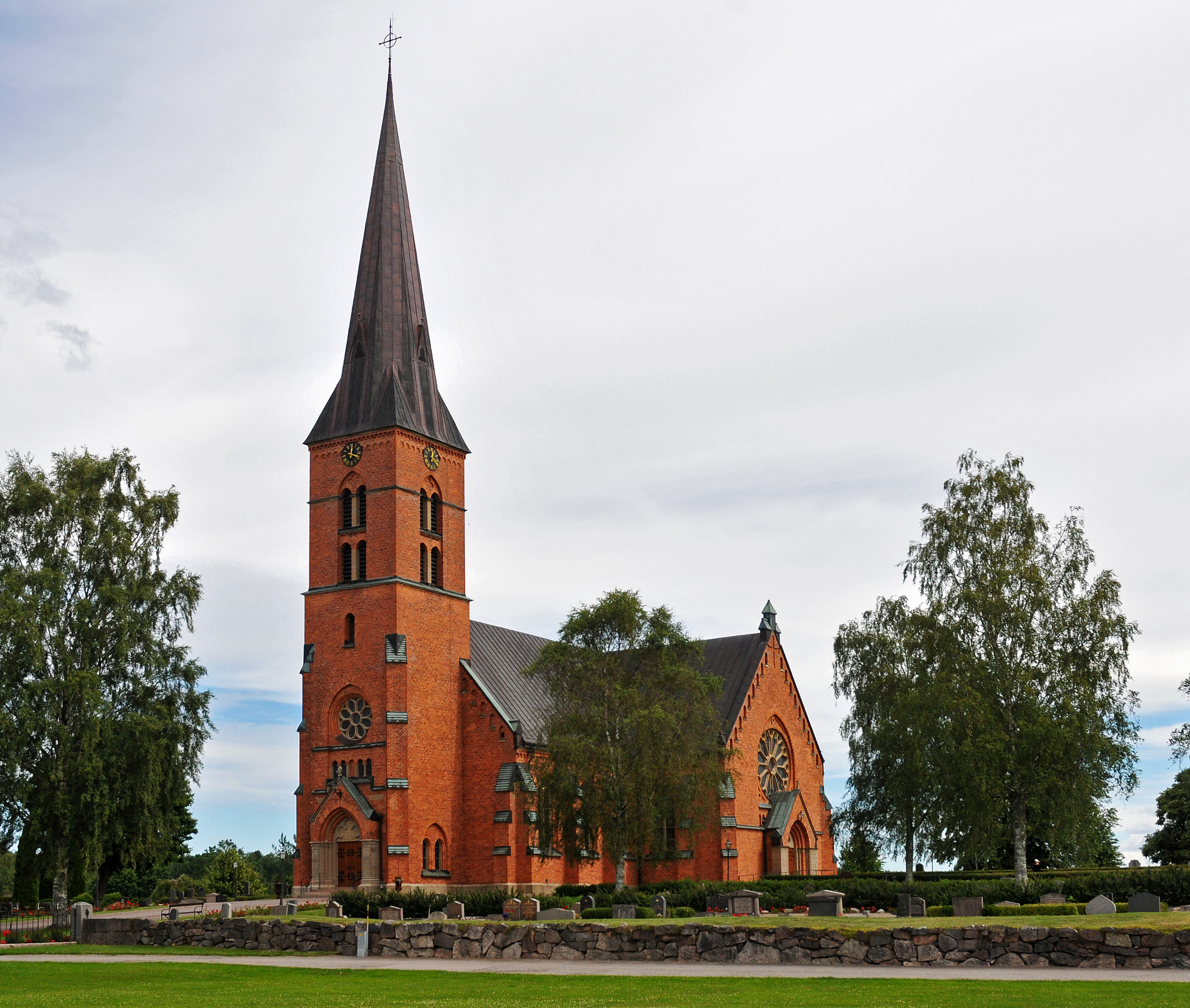 Hällestads kyrka i Finspångs församling i Linköpings stift.